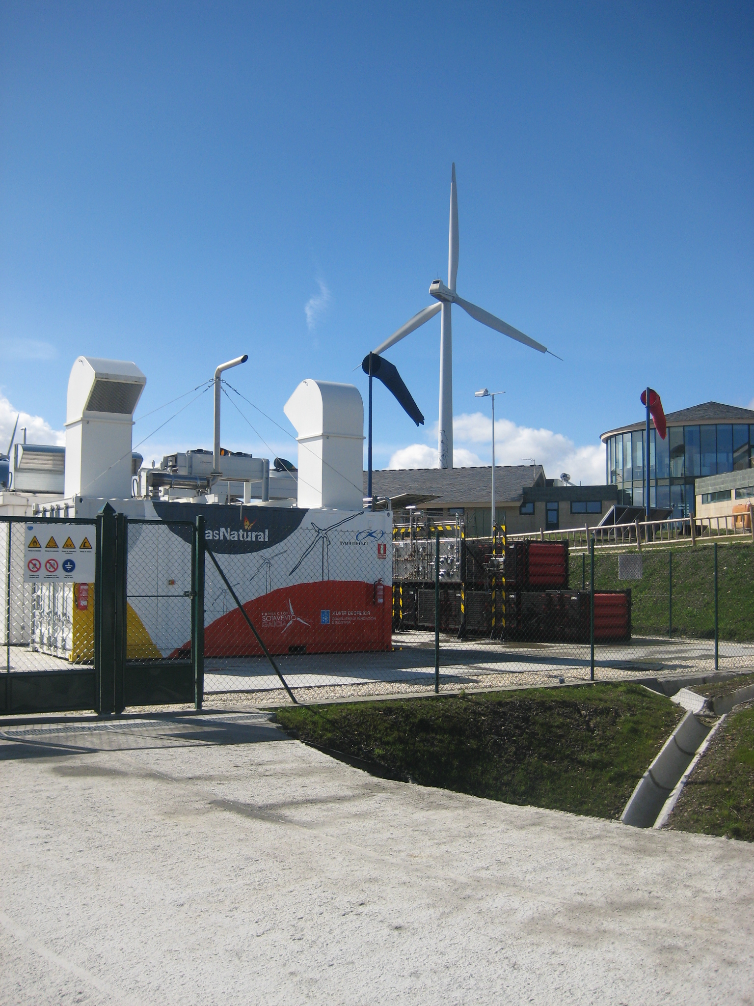 La energía eléctrica se emplea en un electrolizador que a partir del agua, genera H2 a razón de 60 Nm3/h a una presión de 10bar. El electrolizador está montado en un contenedor en el que también se encuentra la sala de control y de potencia eléctrica y los elementos auxiliares, tales como el sistema de tratamiento de agua por ósmosis inversa. Produce la electrólisis del agua generando H2 con una pureza del 99,9%. Este H2 generado se comprime en dos grupos que admiten hasta 61,8 Nm3/h a 4 bar y lo comprimen a 200 bar. Los compresores se encuentran en una caseta de hormigón insonorizada. El H2 a alta presión se almacena a 200 bar en un conjunto de siete bloques de 28 botellas cada uno, proporcionando una capacidad de almacenaje máxima de 1.725 Nm3.